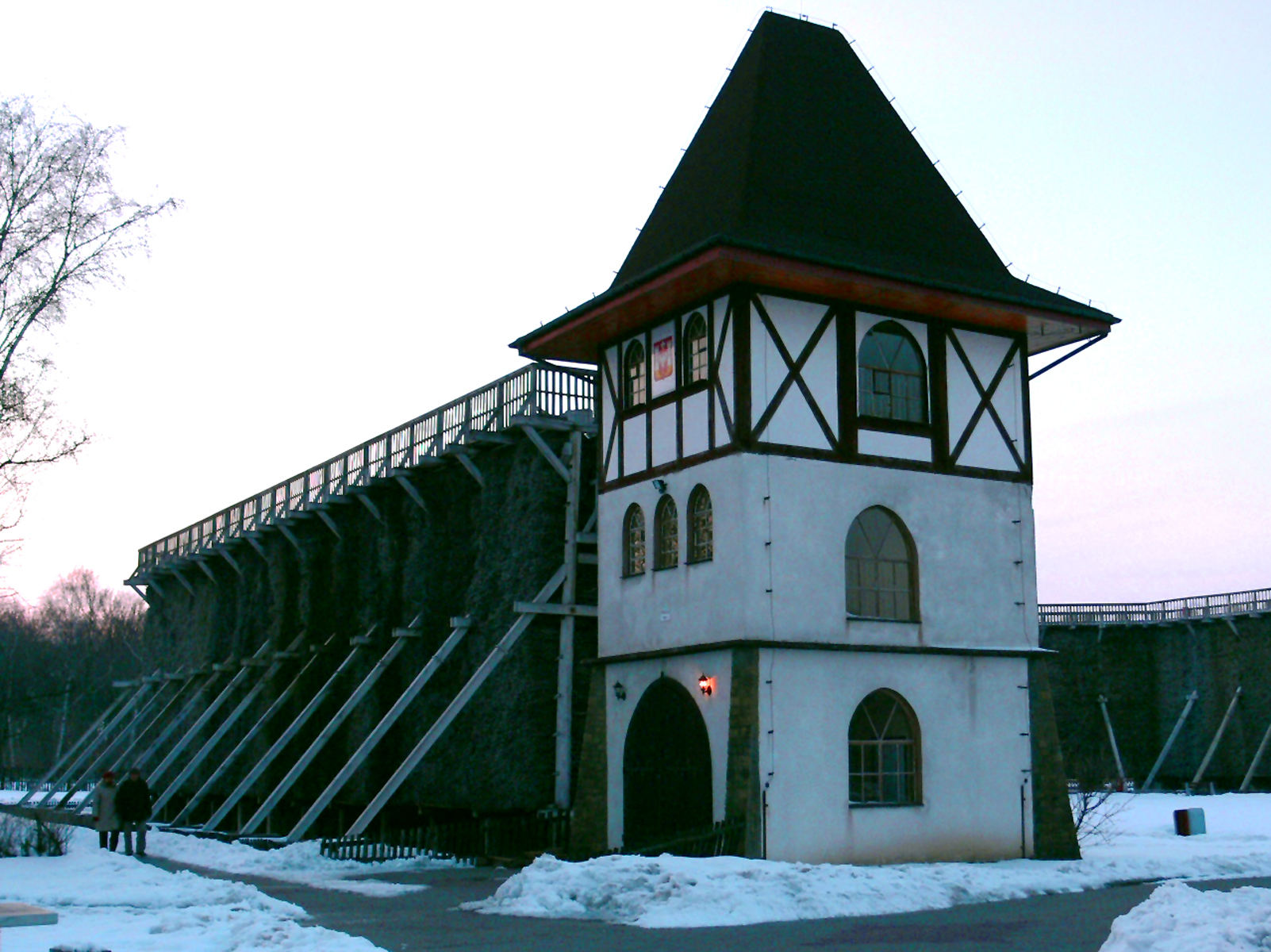 Inowrocław - Tężnia solankowa.